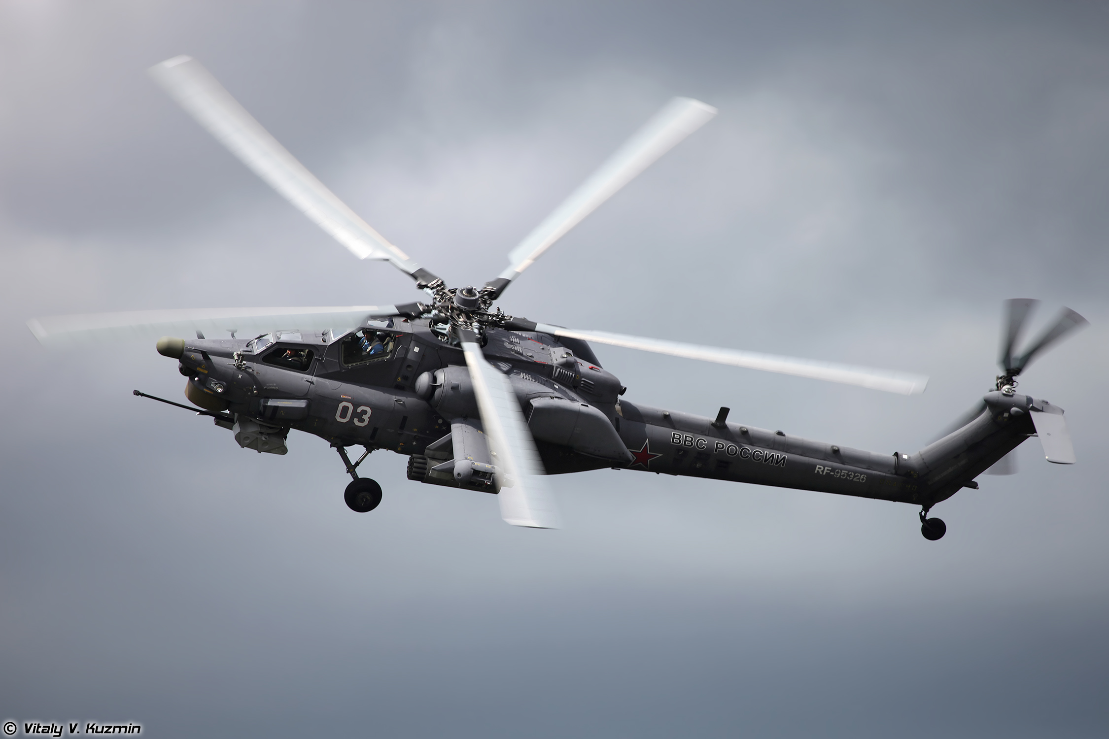 Aviamix 2015